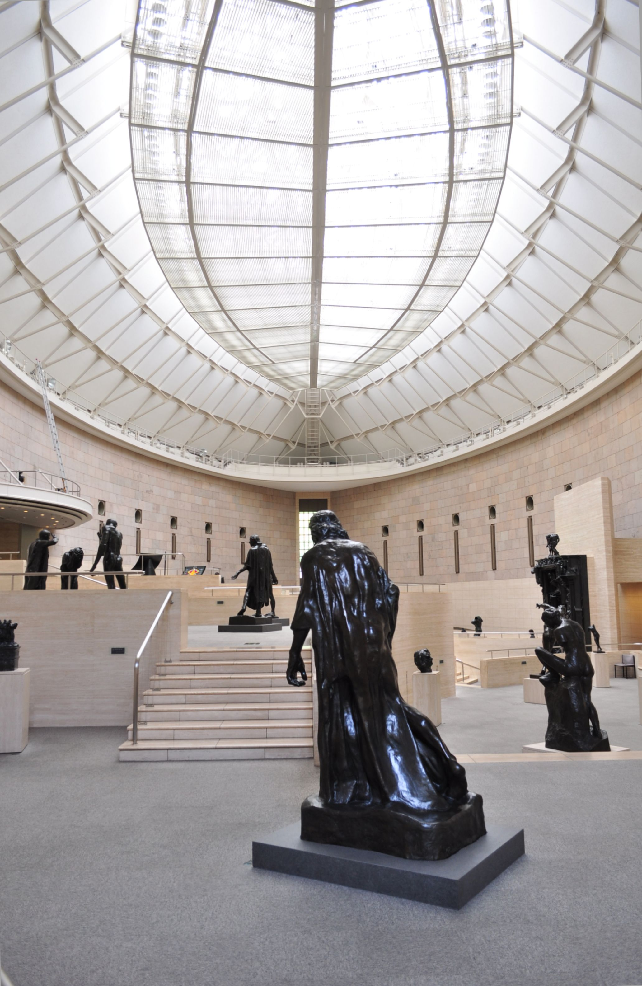 2014年7月16日撮影